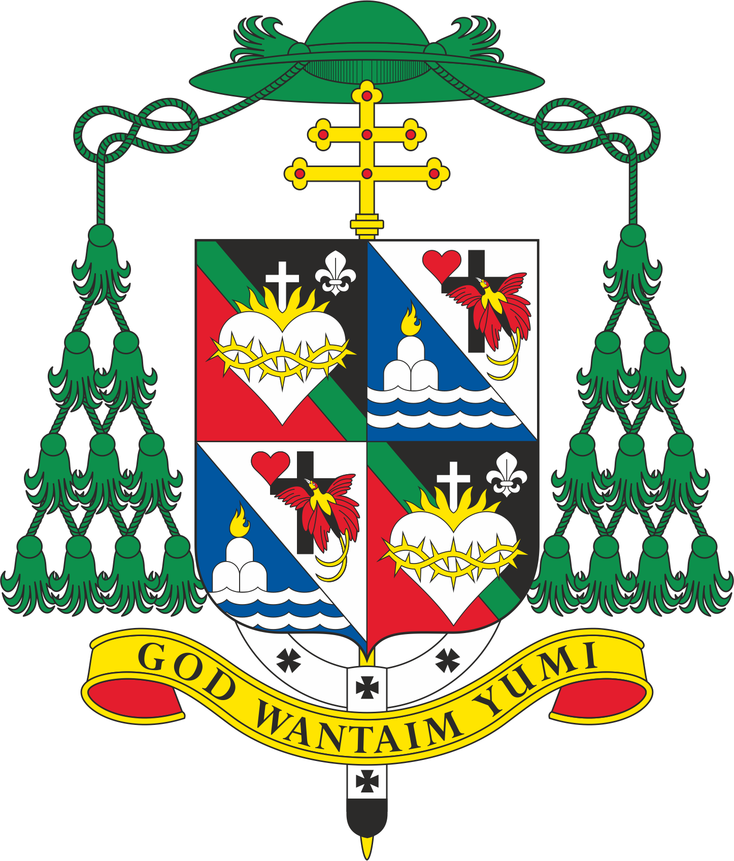 Personal coat of arms of Archbishop Rochus Josef Tatamai, Archbishop of Rabaul